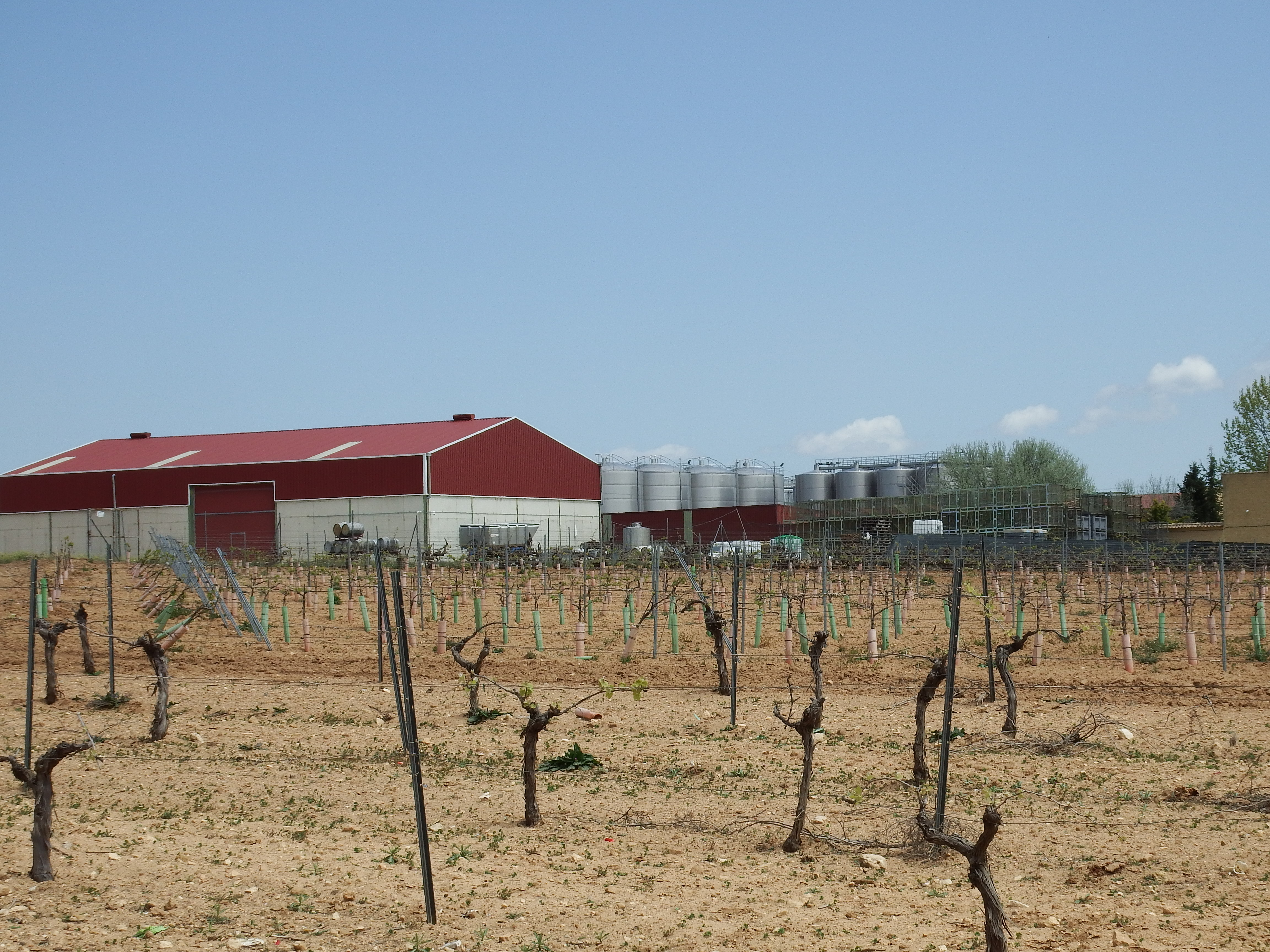 Fotos de Fuente de Pedro Naharro tomadas en Wiki Takes Cuenca 2018